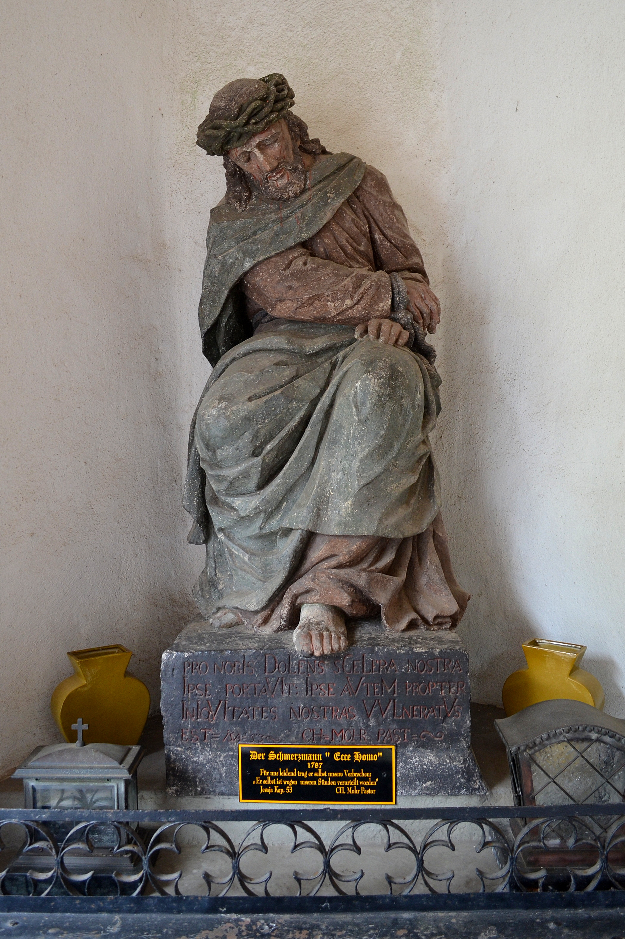 Ecce Homo